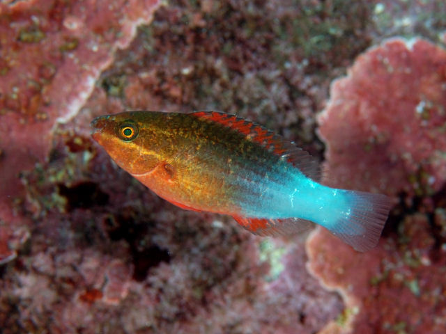 アミメブダイ Scarus frenatus